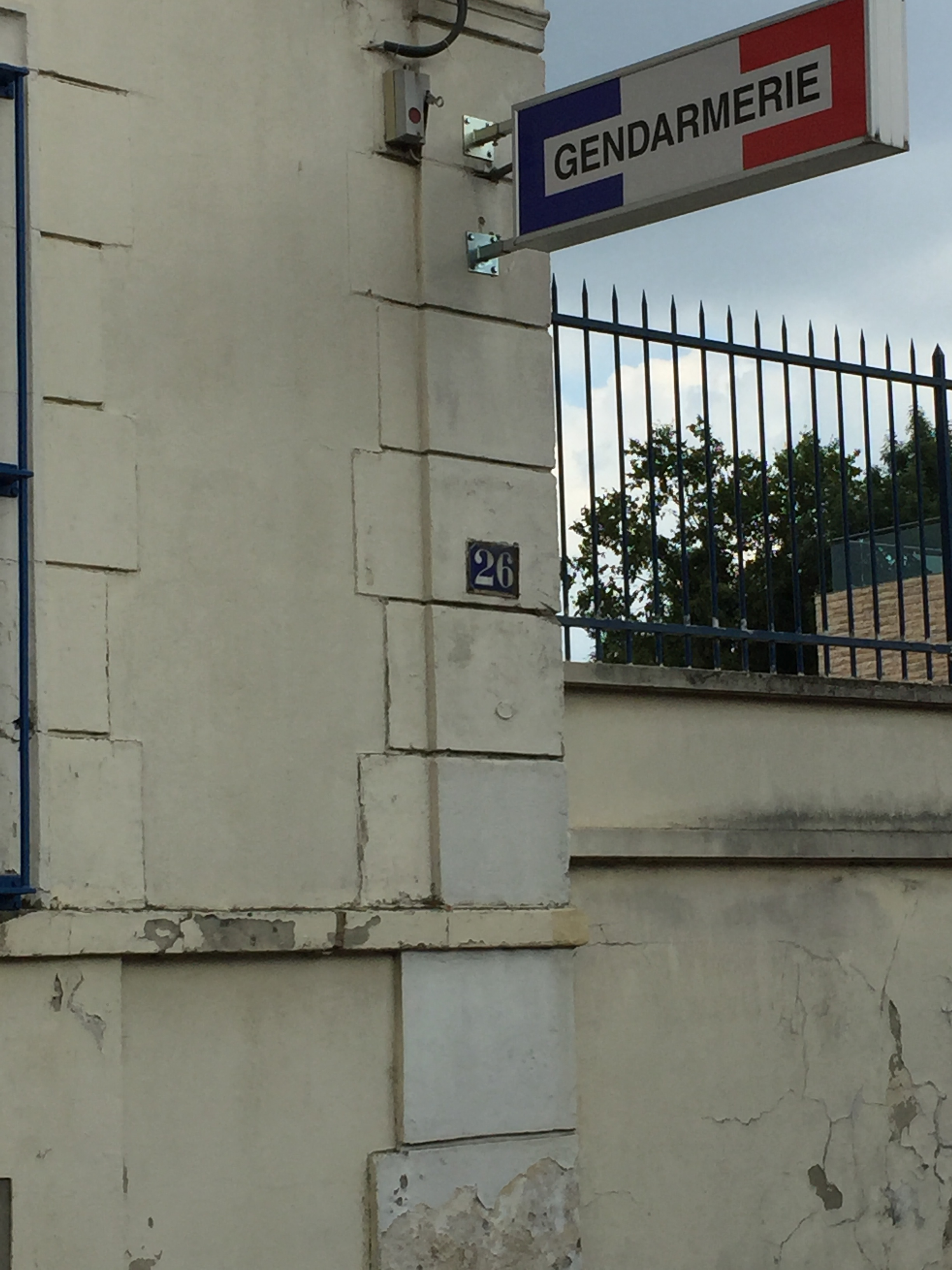 Gendarmerie de Persan (Val -d'Oise, France) en 2018